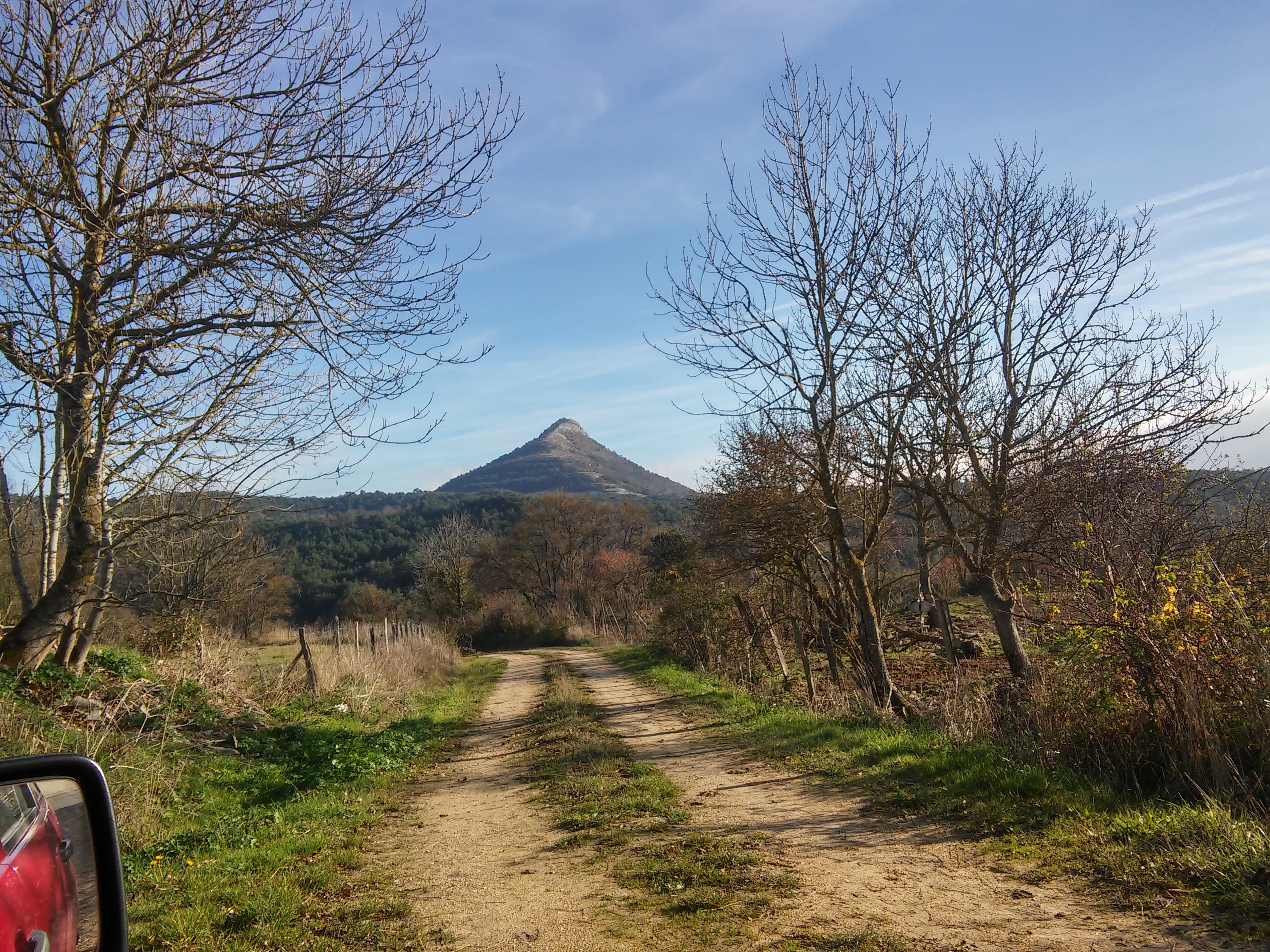 Marinda mendia Gibilloarrate herritik (Kuartango)